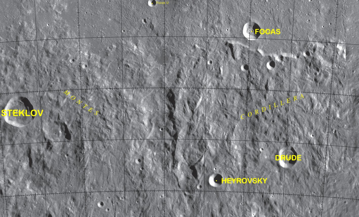 Cráter lunar Focas. Localización. (Imagen LROC)